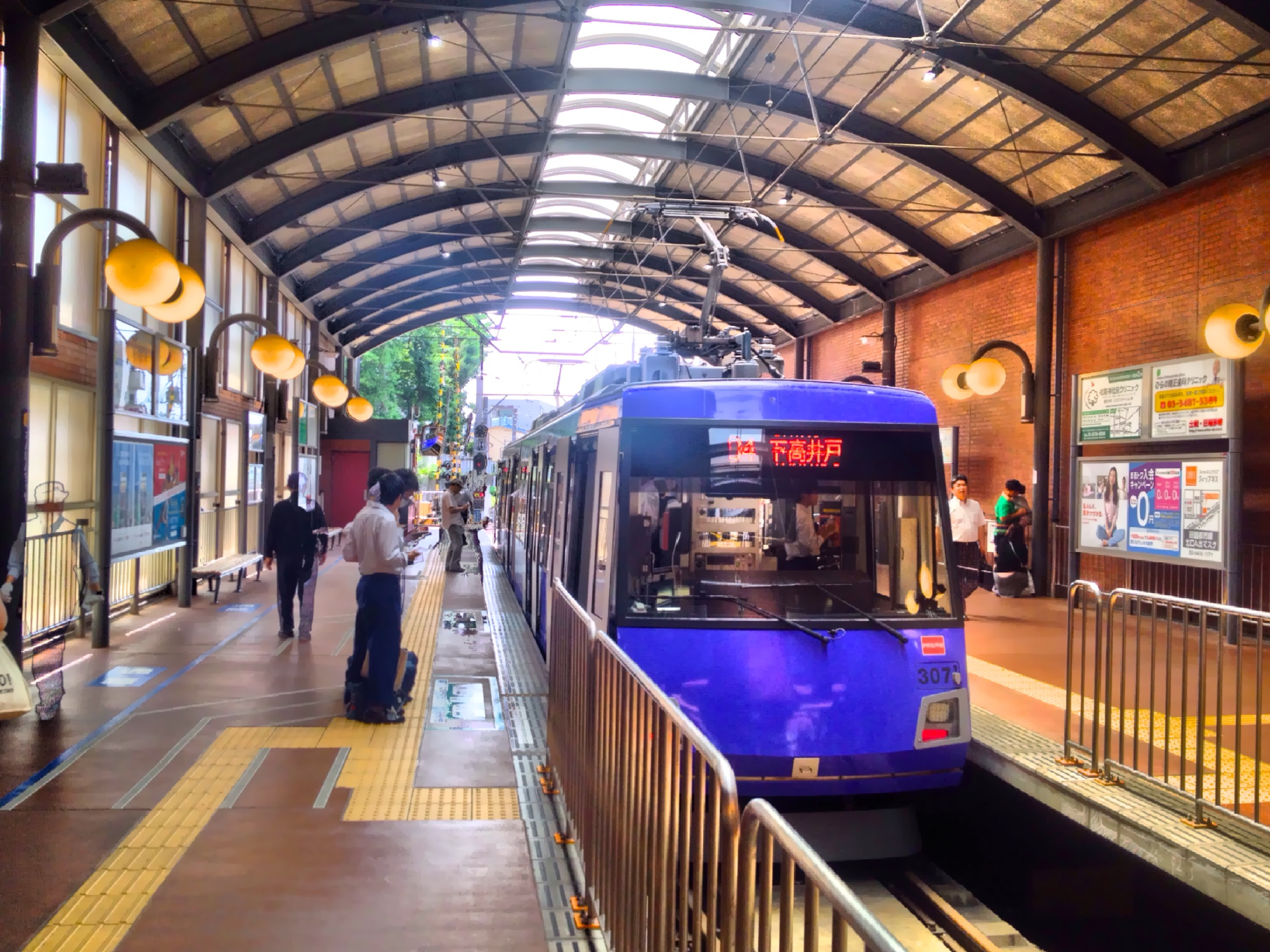 三軒茶屋駅 (Sangenjaya station)